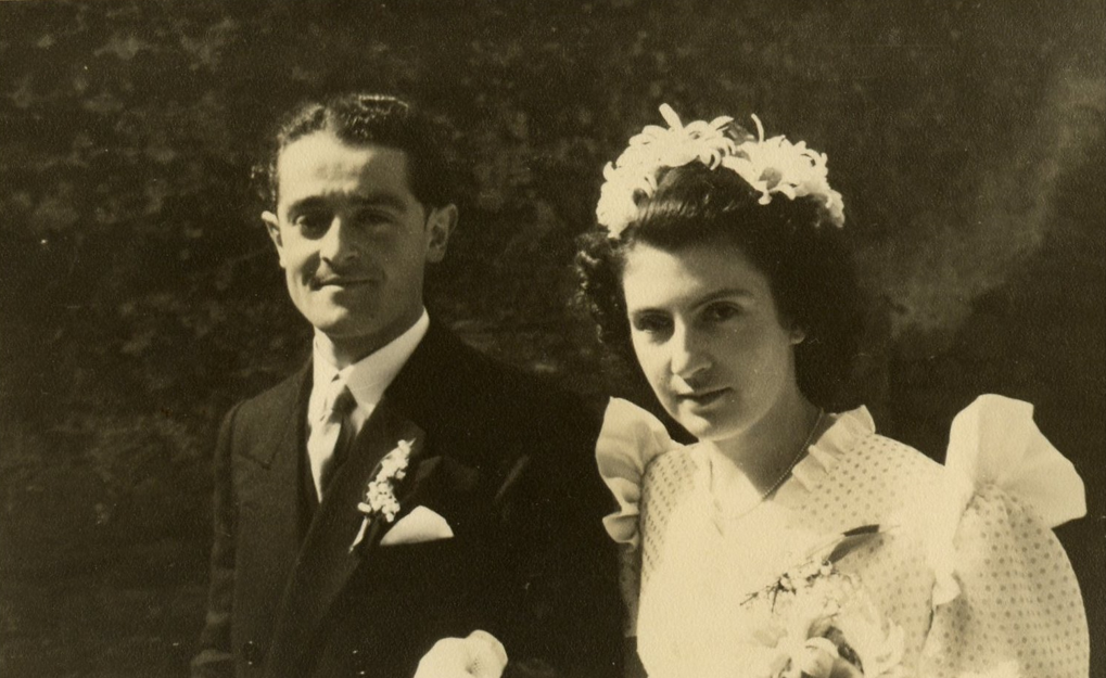 Marcel et Madelain Viaud